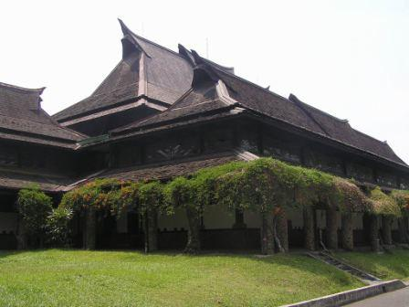 Aula Barat Kampus IPB